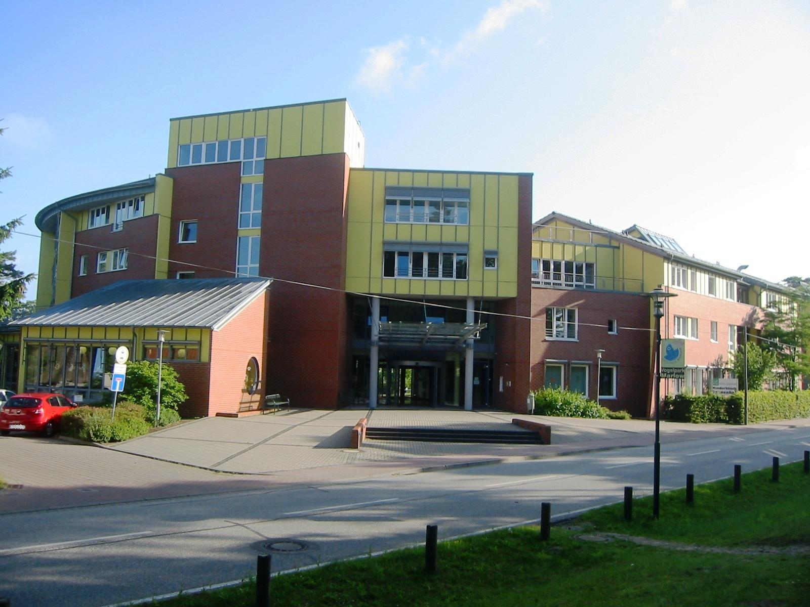 Kinderklinik "Tannenhof" in der Ribnitzer Straße in Graal-Müritz. Die Straße "Am Tannenhof" ist nach der Klinik benannt. Sie liegt nördlich der Ribnitzer Straße.